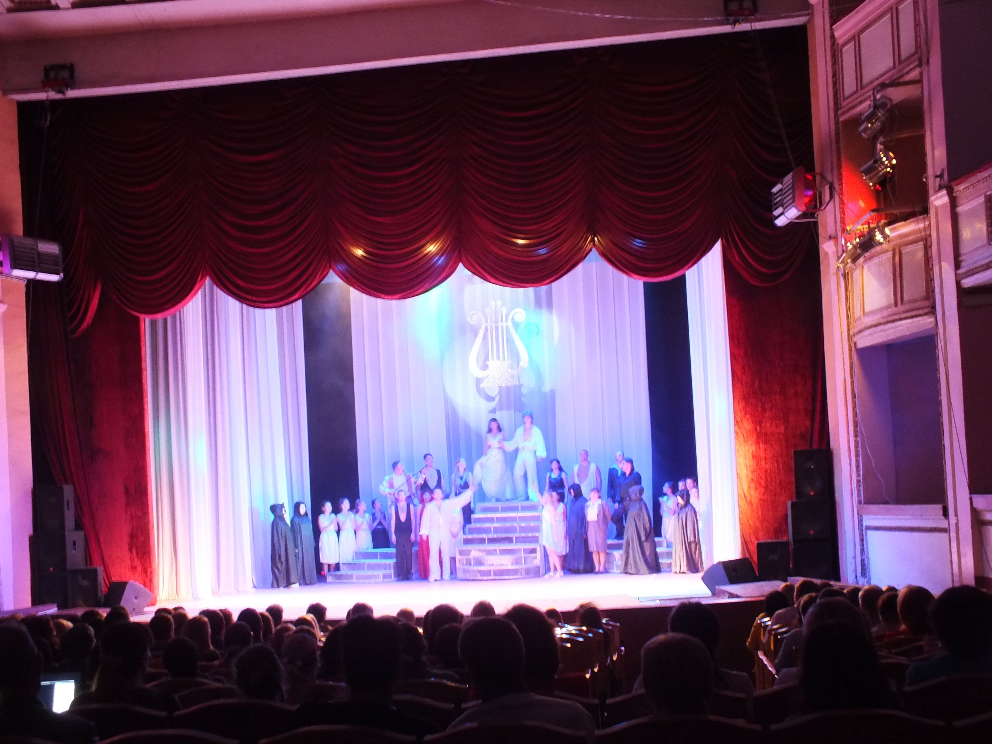 Уссурийск, Драматический театр Восточного военного округа